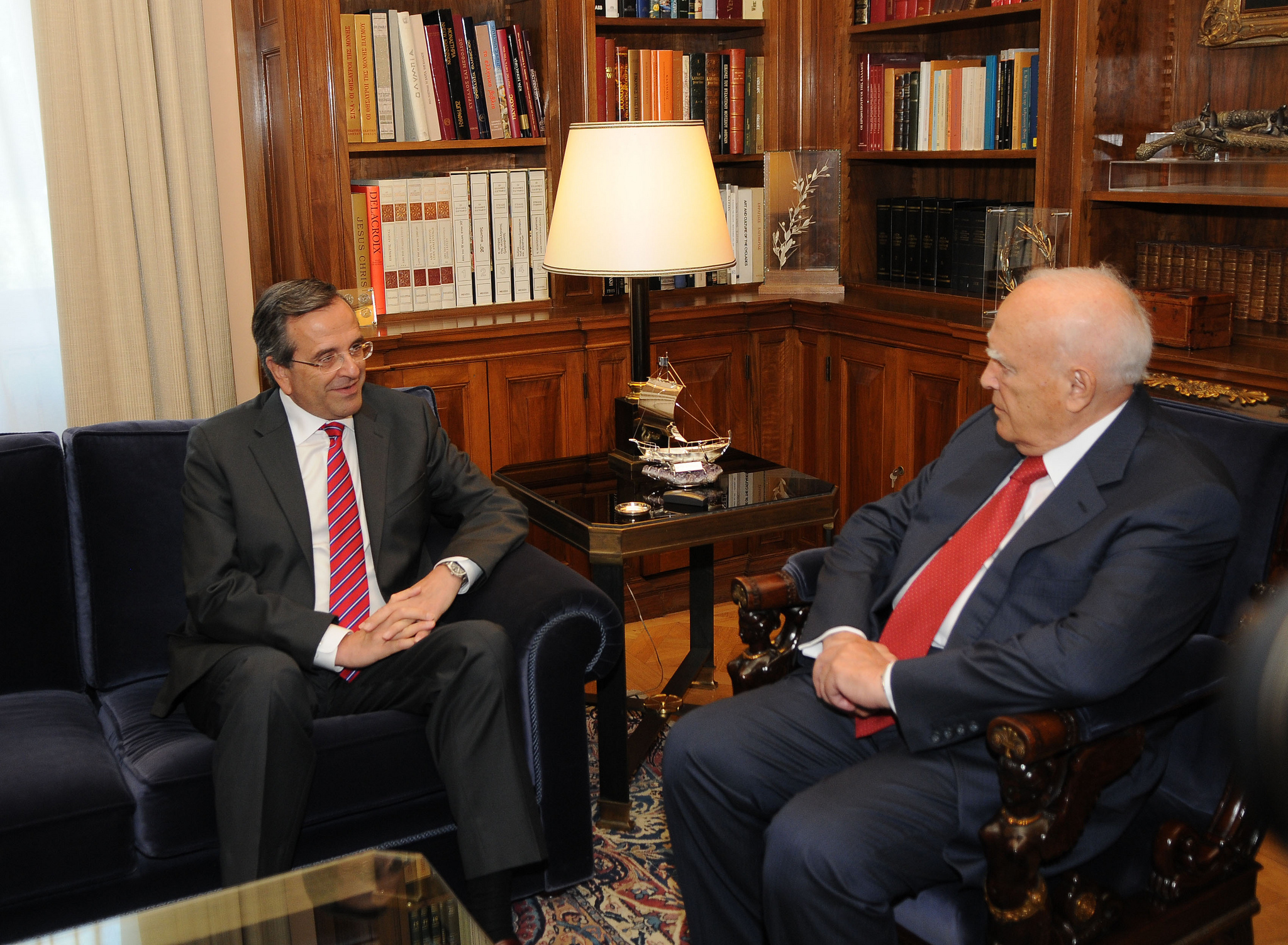 Αντώνης Σαμαράς - Κάρολος Παπούλιας